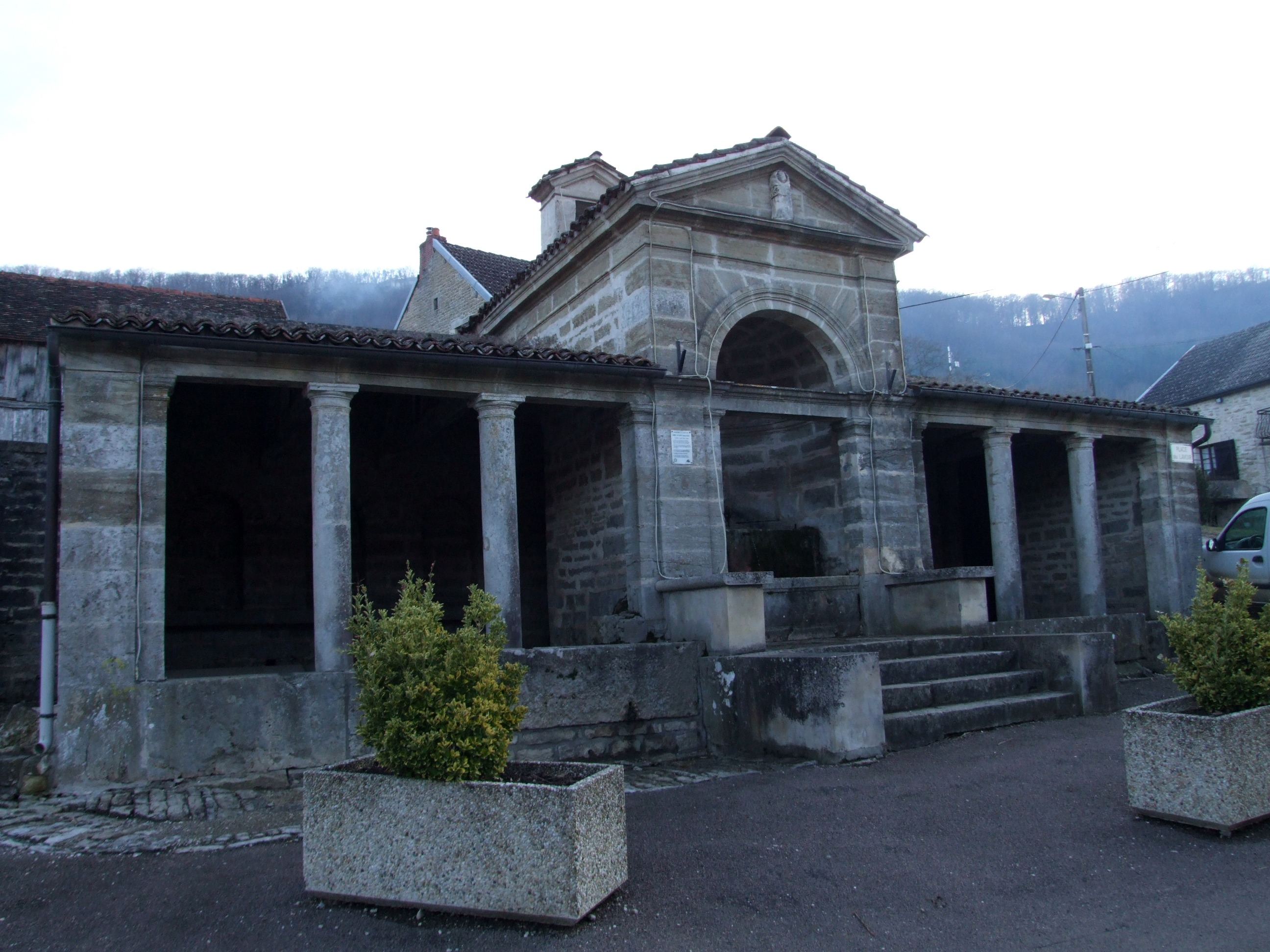 Lavoir de Saint Fiacre, Hameau de Jaugey, Barbirey-sur-Ouche, Côte-d'Or, Bourgogne, FRANCE